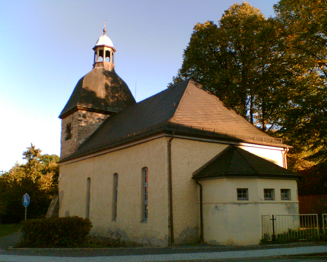 Alte Kirche, Bad Suderode, Deutschland